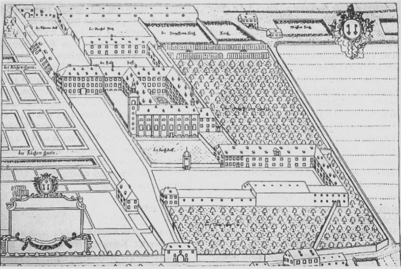 Perspektivisch Darstellung des Klostergutes mit den Gärten (um 1720)